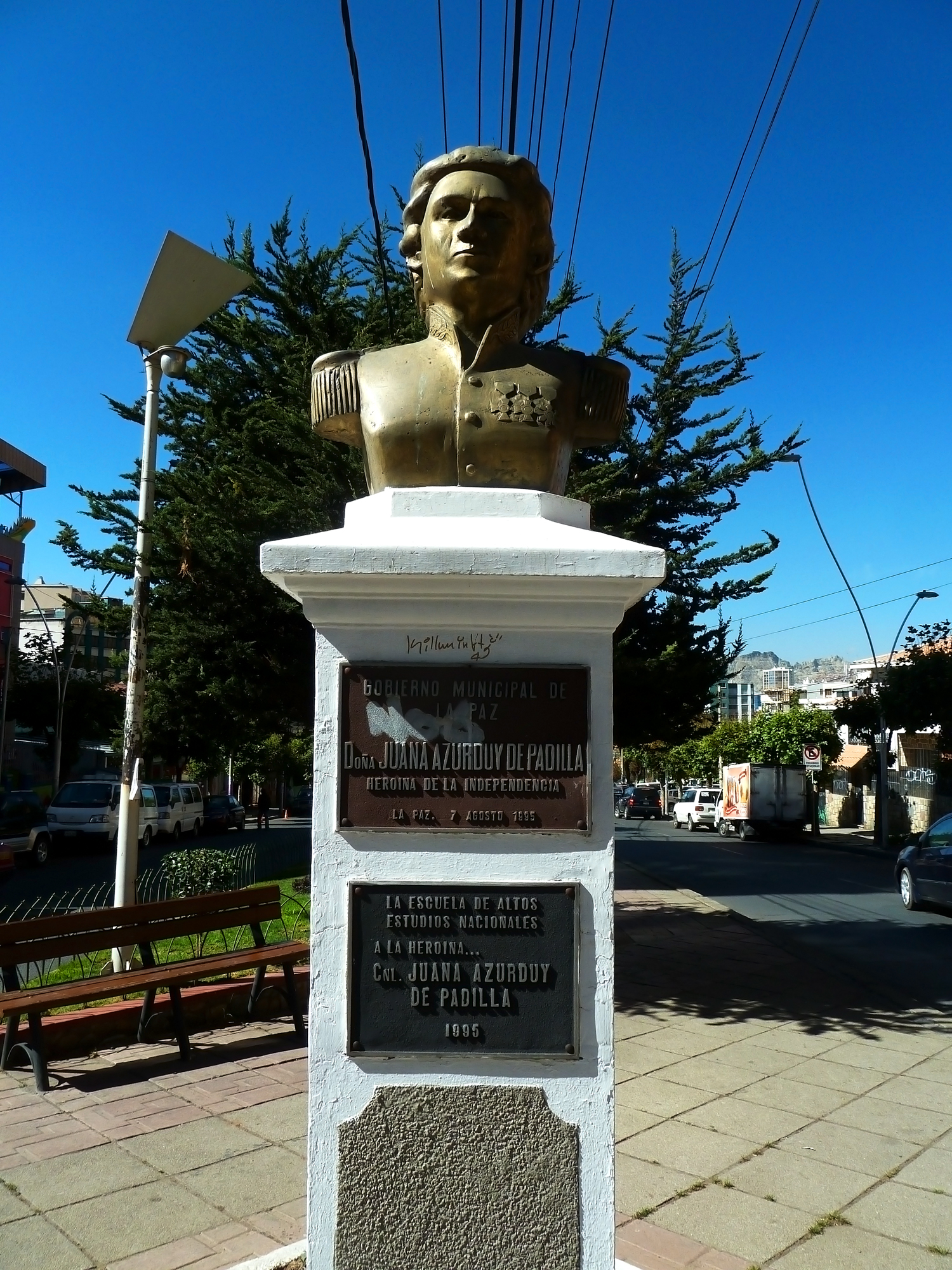 Juana Azurduy de Padilla This medium shows the protected monument with the number L/00-243 in Bolivia.